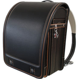 ベーシックモデル